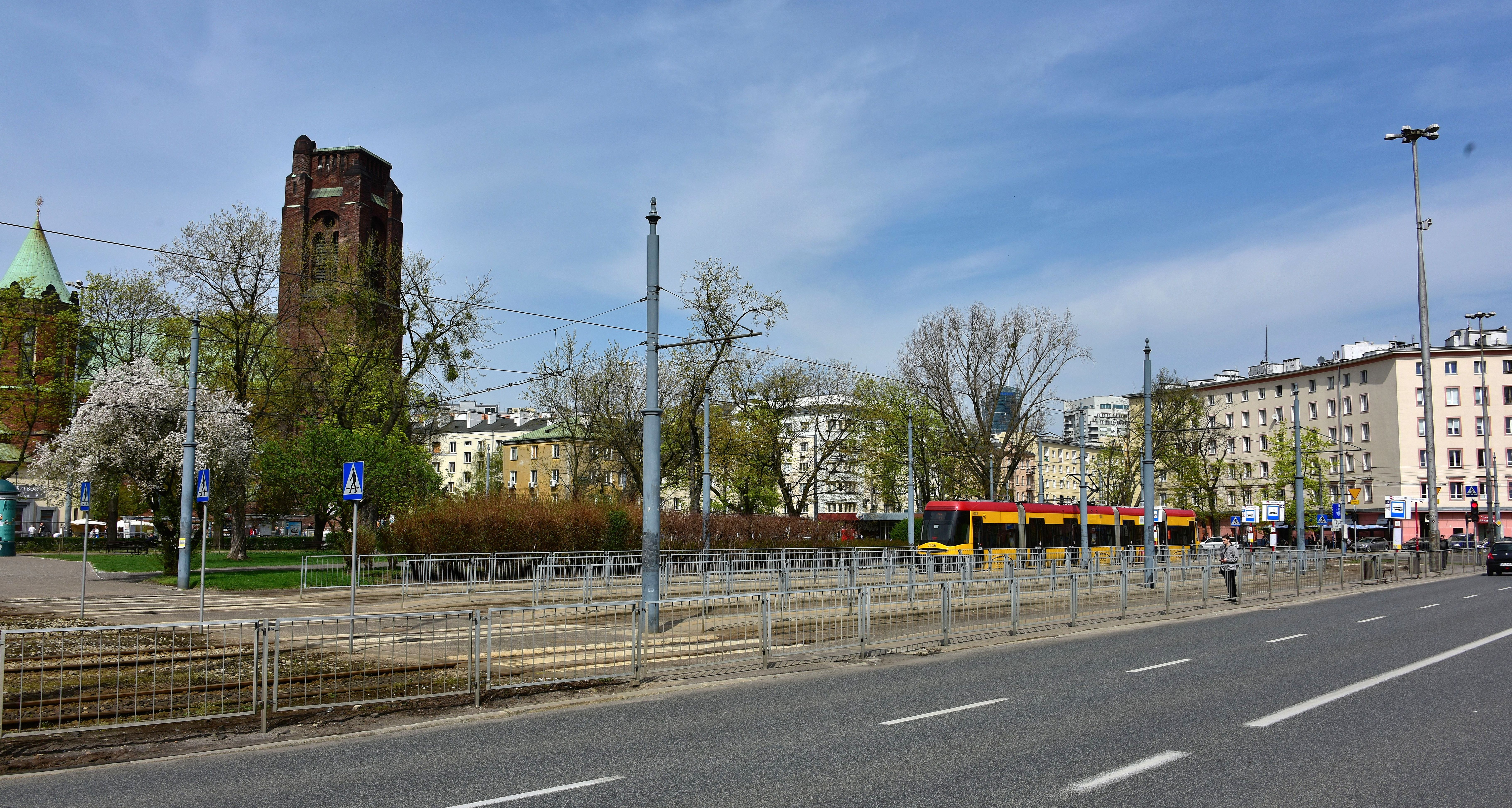 Plac Narutowicza w Warszawie